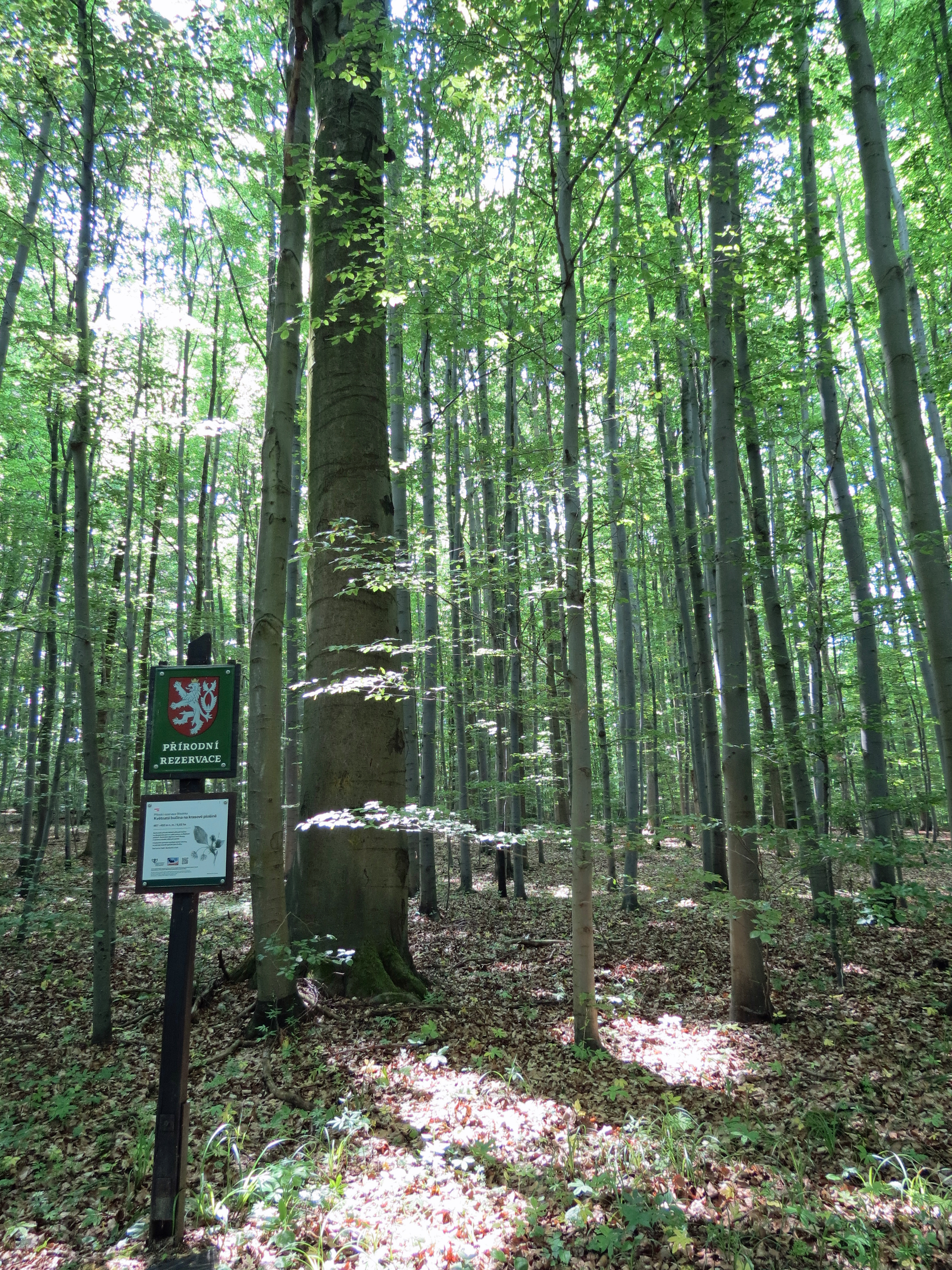 PR Březinka